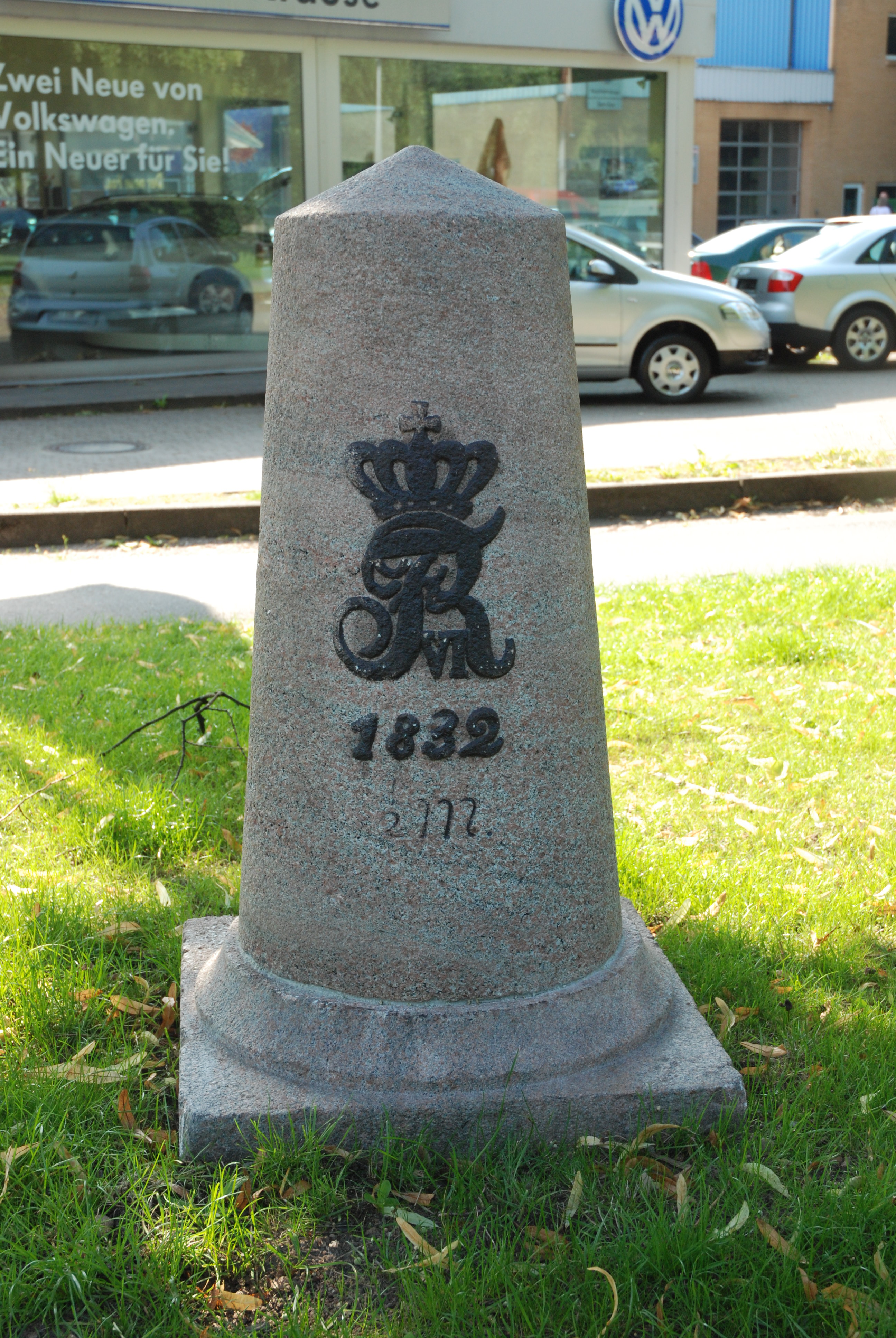 Meilenstein von 1832 an der Bundesstraße 4 in Bad Bramstedt (Altona/Kiel)